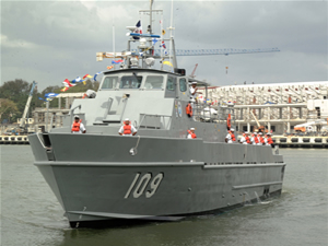 Guardacostas Orión (GC-109)